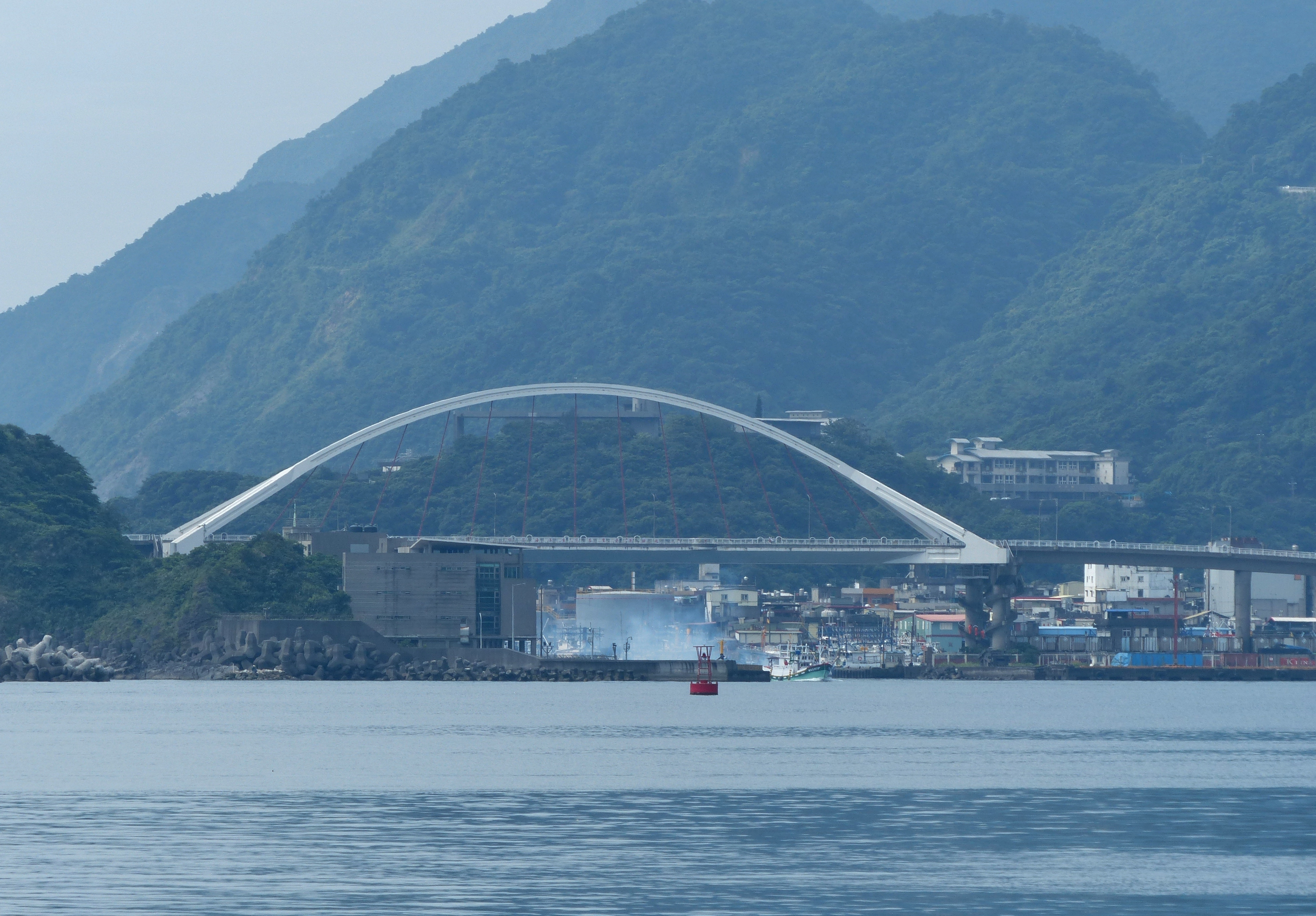 中文（台灣）: 從北方澳中正軍港12號碼頭南端南望南方澳大橋與出港中的漁船。